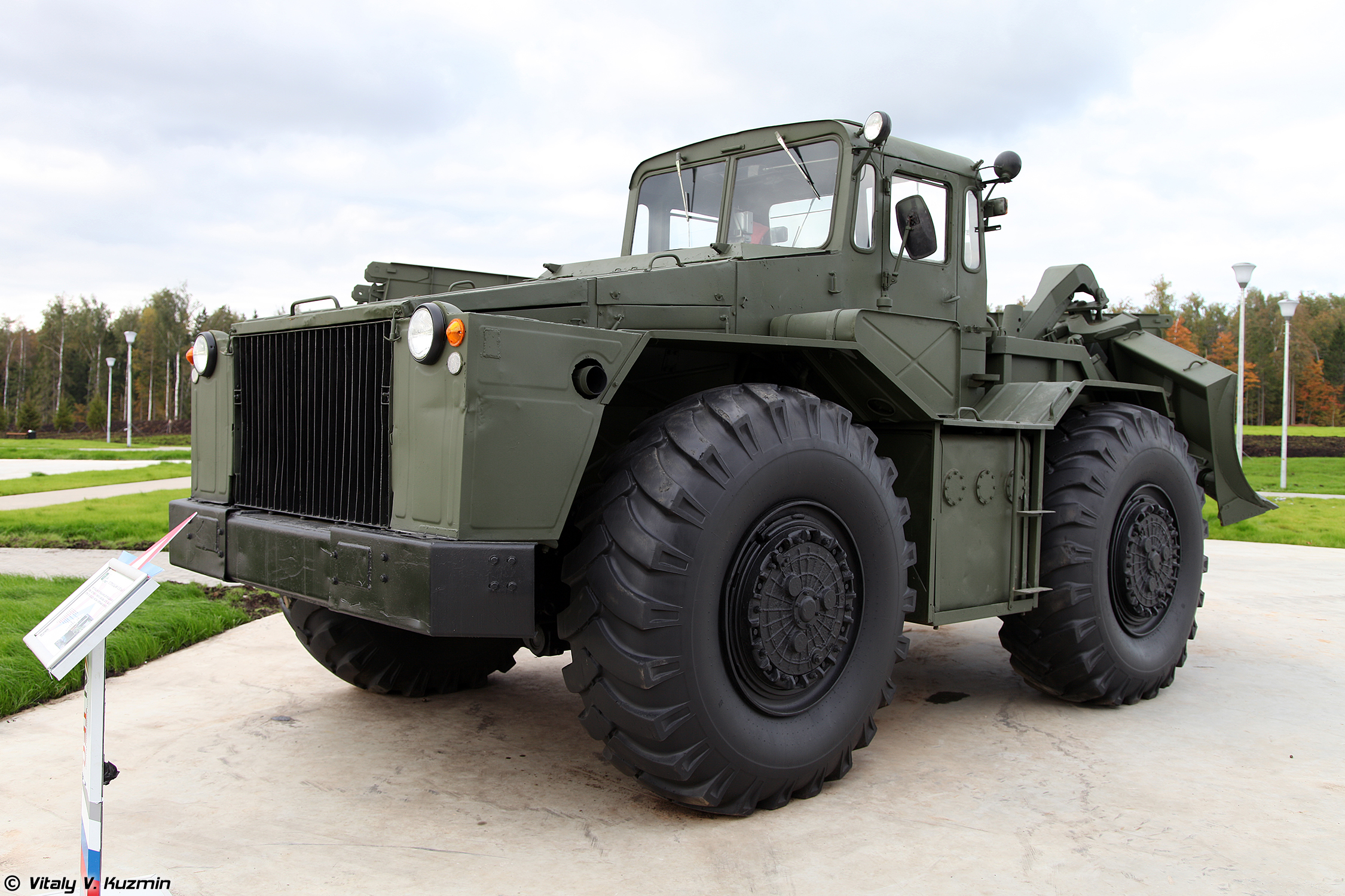 Путепрокладчик ПКТ